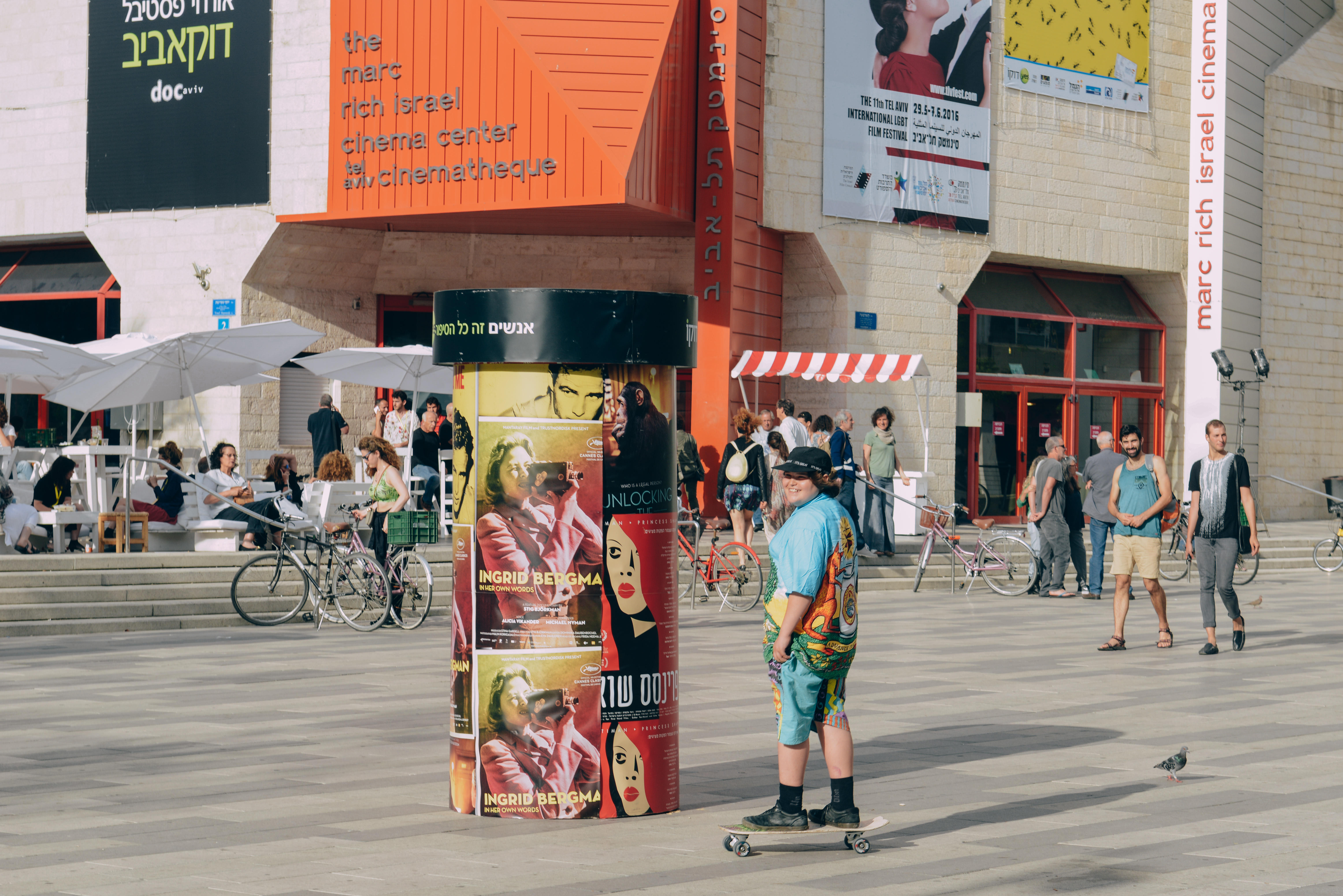 רחבת הסינמטק בימי הפסטיבל